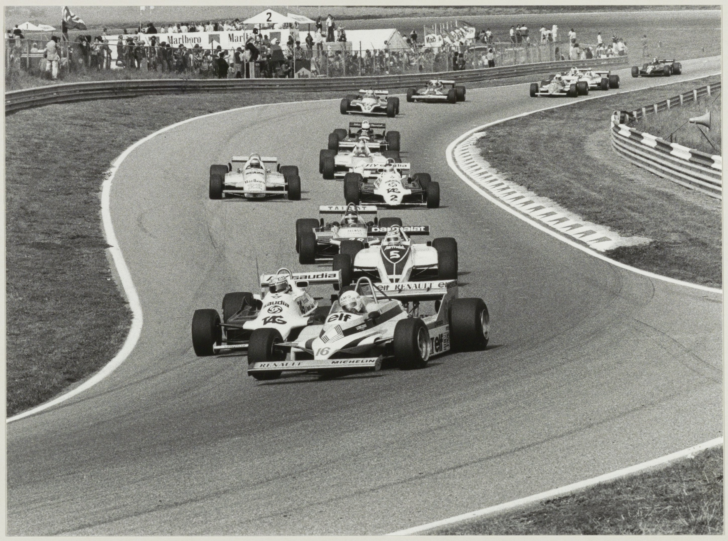 CollectieCollectie Fotoburo de BoerInventarisnummerNL-HlmNHA_54012374NL-HlmNHA_1478_21088KBeschrijvingDe Grand Prix van Zandvoort 1981 op het circuit.FotonummerNL-HlmNHA_1478_6710DocumenttypeTopografische prenten, tekeningen en foto'sVervaardigerBoer, Cees de (1918-1985) Soort vervaardigerFotograaf AnnotatiesHD.281081LandNederland ProvincieNoord-Holland GemeenteZandvoort PlaatsZandvoort StraatBurgemeester van Alphenstraat GeografischCircuit Park Zandvoort Begindatum28-10-1981Einddatum28-10-1981TechniekFoto TrefwoordenSport en recreatie, Autosport, Autoraces